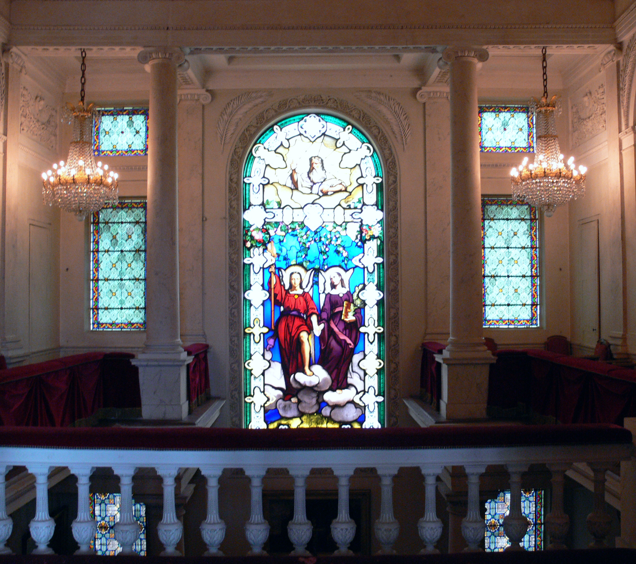 Compiègne, France: Château de Compiègne Les appartements historiques Chapelle du Château